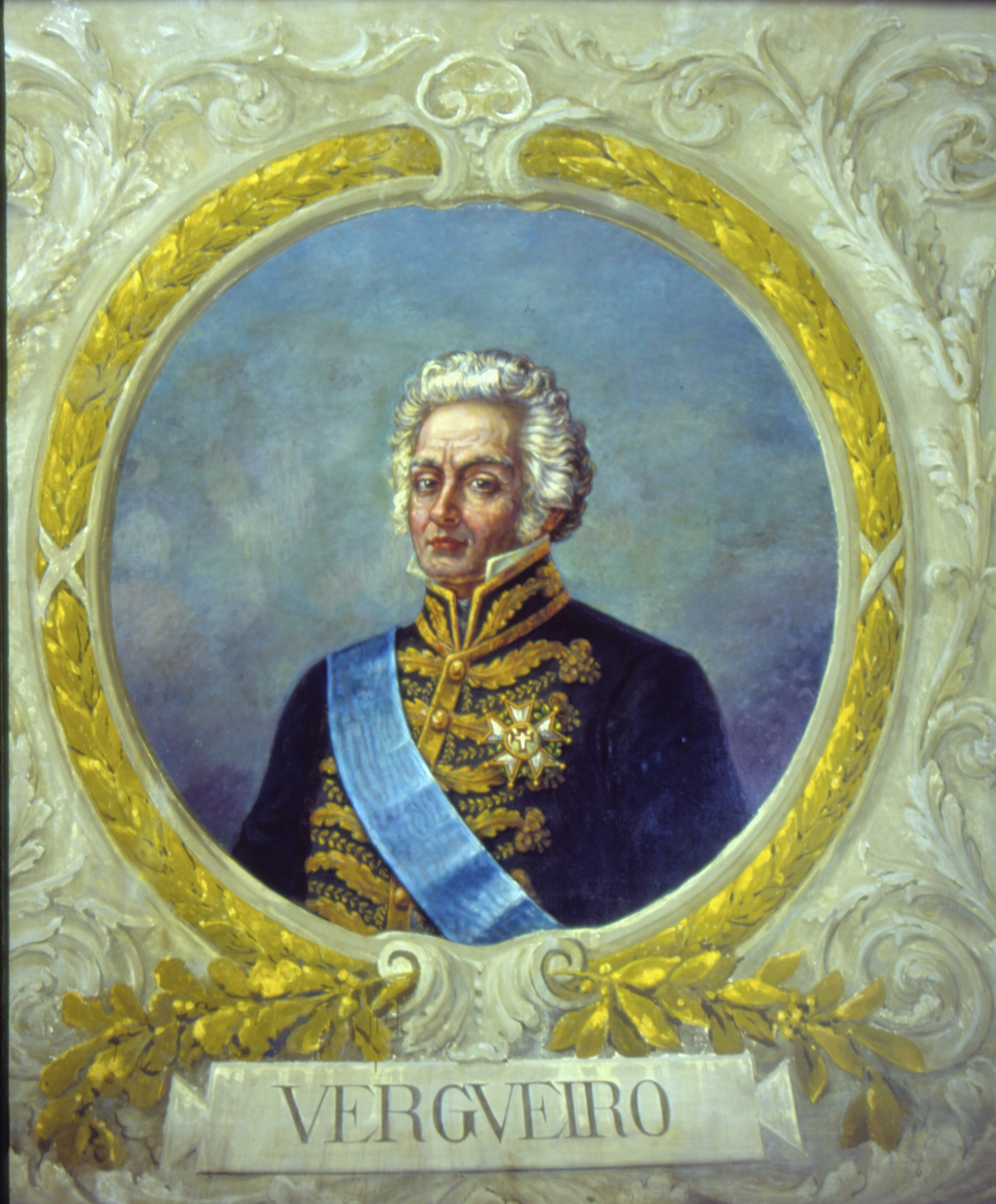 Obra que integra o acervo do Museu Paulista da USP. Coleção Fundo Museu Paulista - FMP